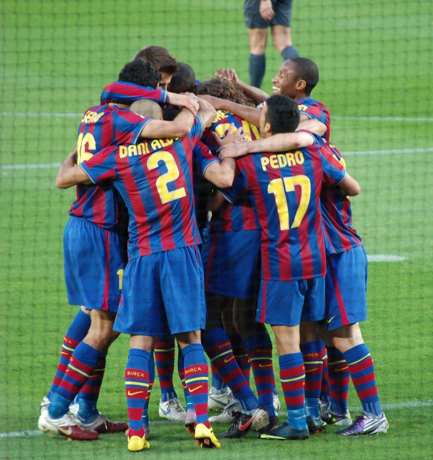 Los jugadores del FC Barcelona, en una celebración en el último partido del campeonato liguero, contra el Valladolid, donde se proclamaron campeones como el equipo con mejor puntuación de la historia de la Liga.